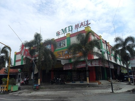 MD Mall Blora